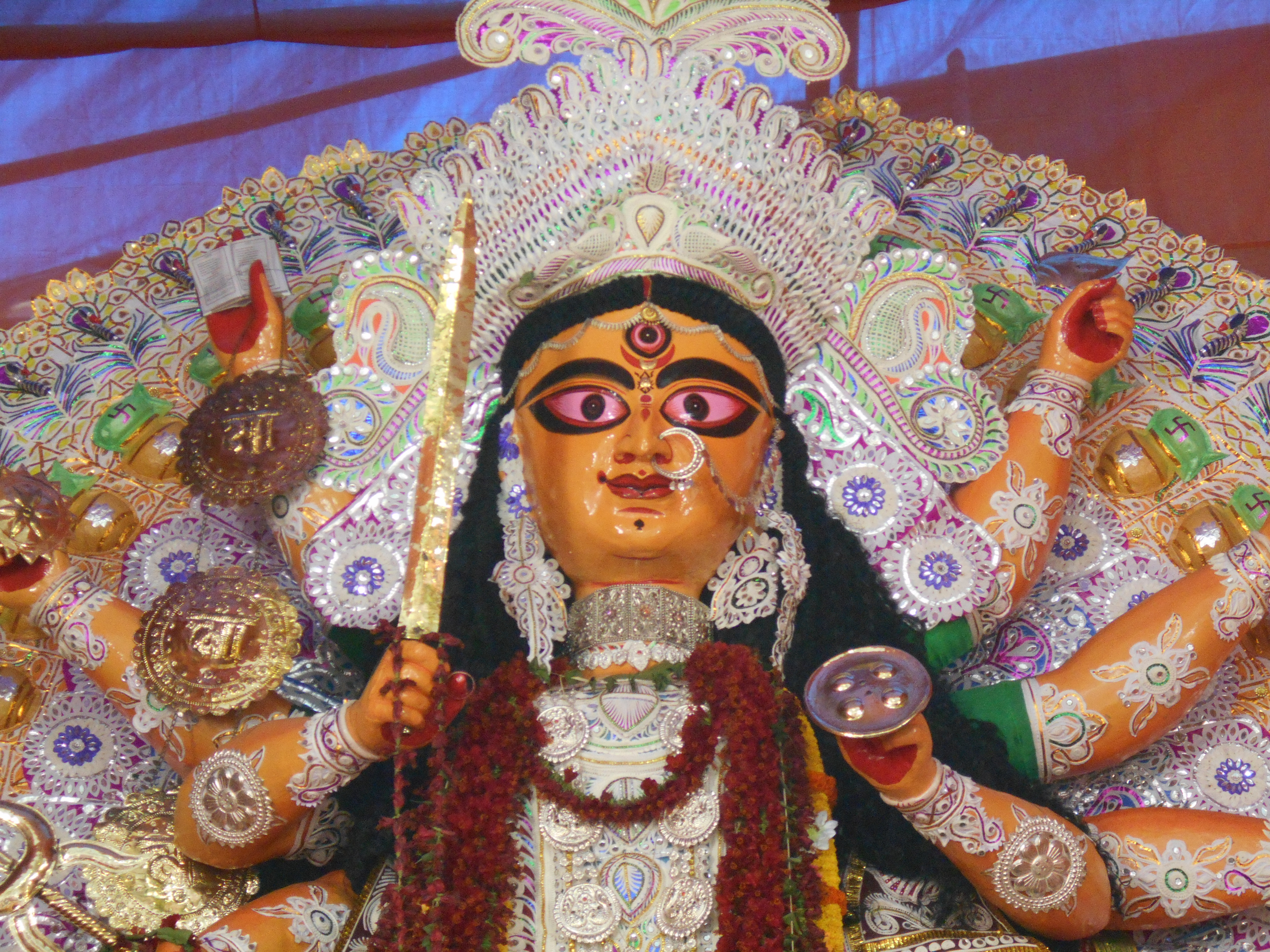 ডুমুরেস্বরী মাতা